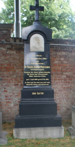 Wiener Zentralfriedhof-Franz Proschko